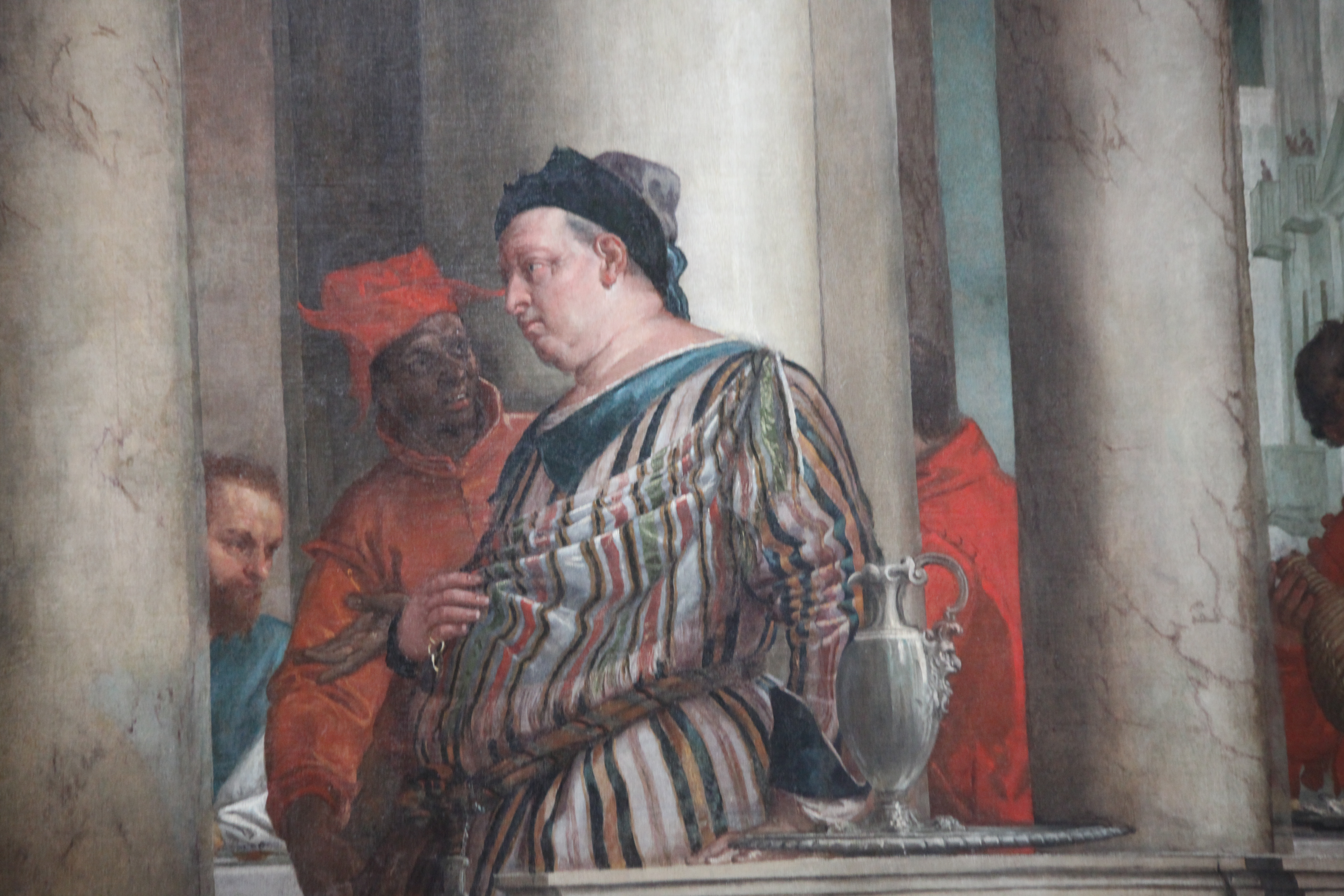 Gallerie dell'Accademia - MIBAC This is a photo of a monument which is part of cultural heritage of Italy.